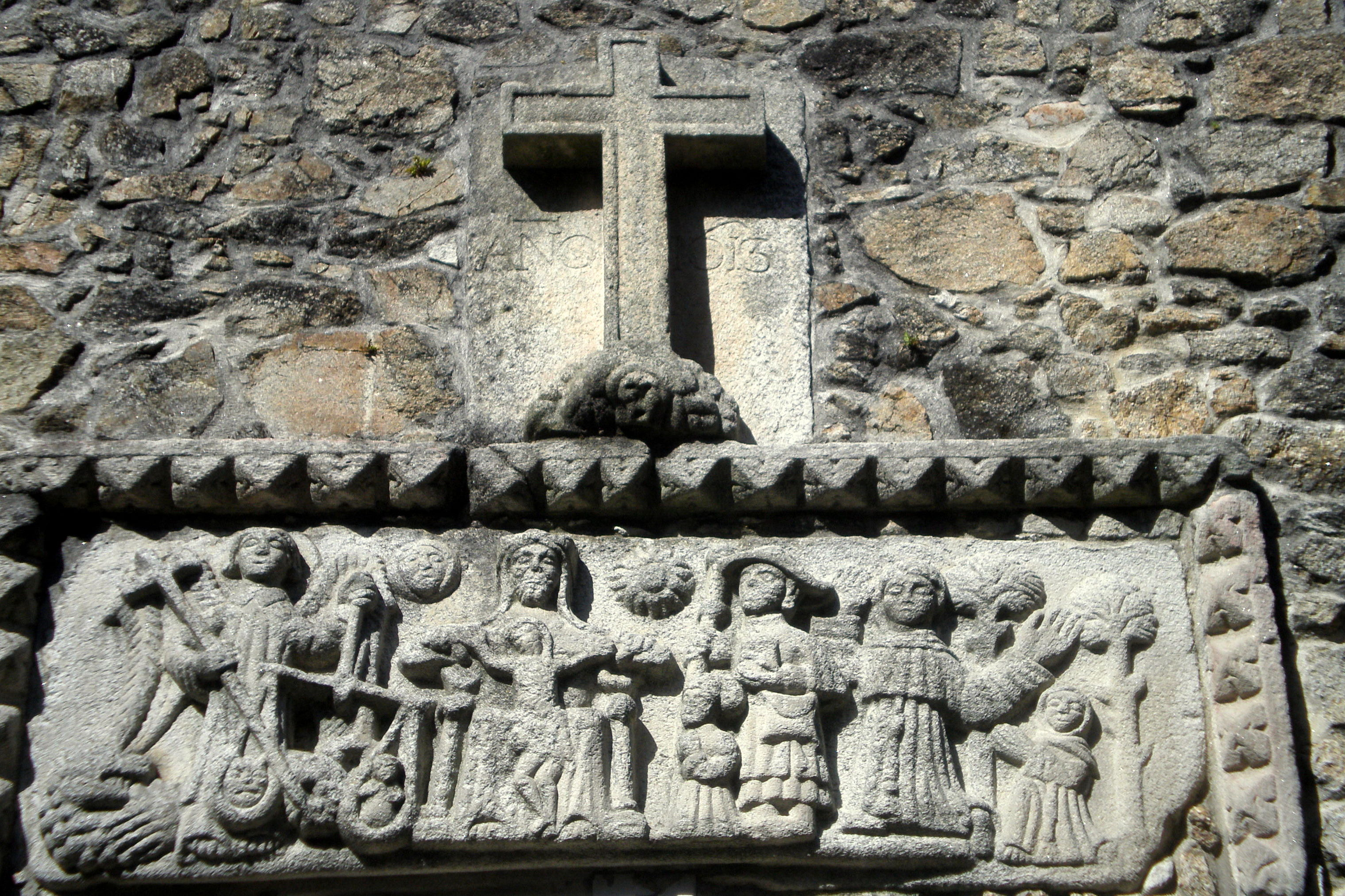 Convento das Bárbaras. Relievo da portada. A Coruña